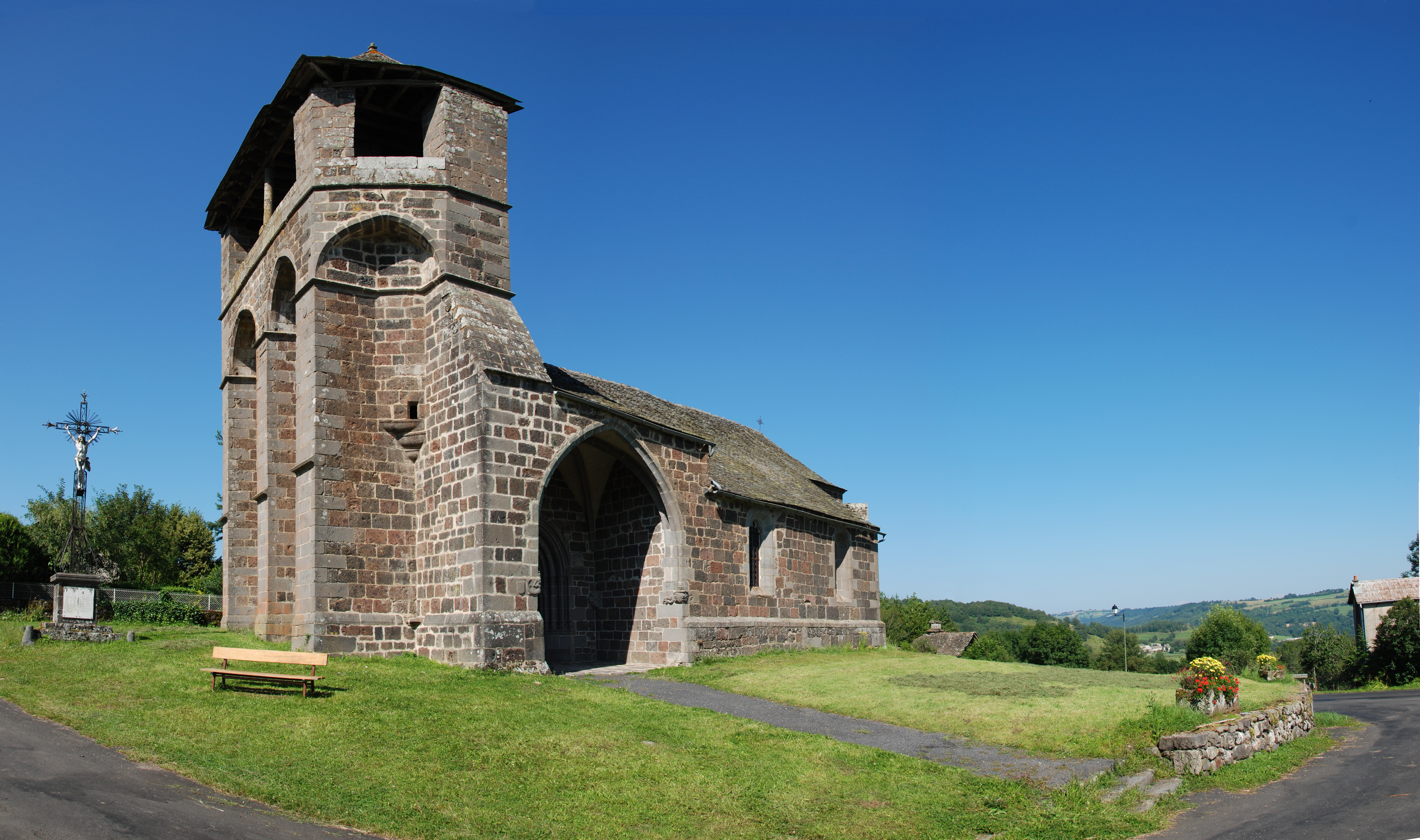 L'église Saint Roch à Albinhac, commune de Brommat .